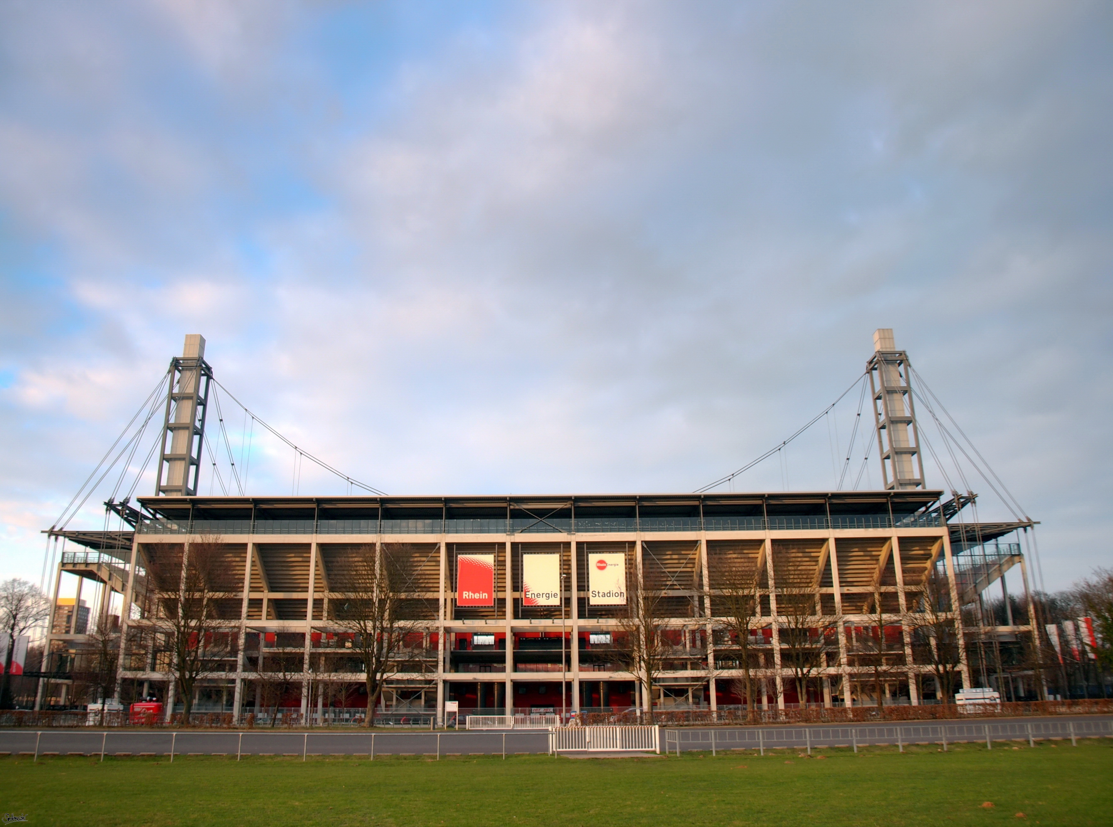 Rhein Energie Stadion Südseite HDR